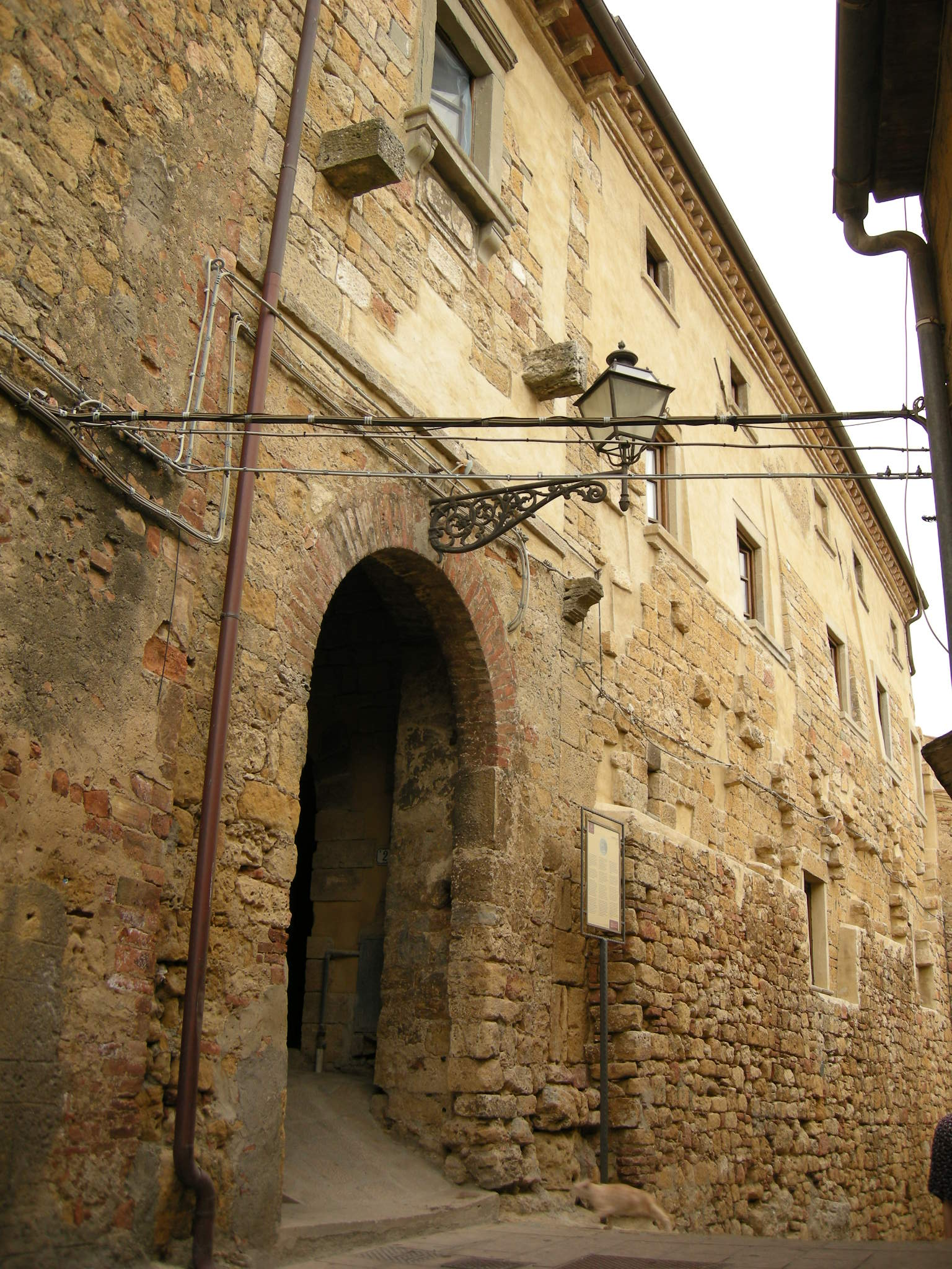 Guardistallo, castello